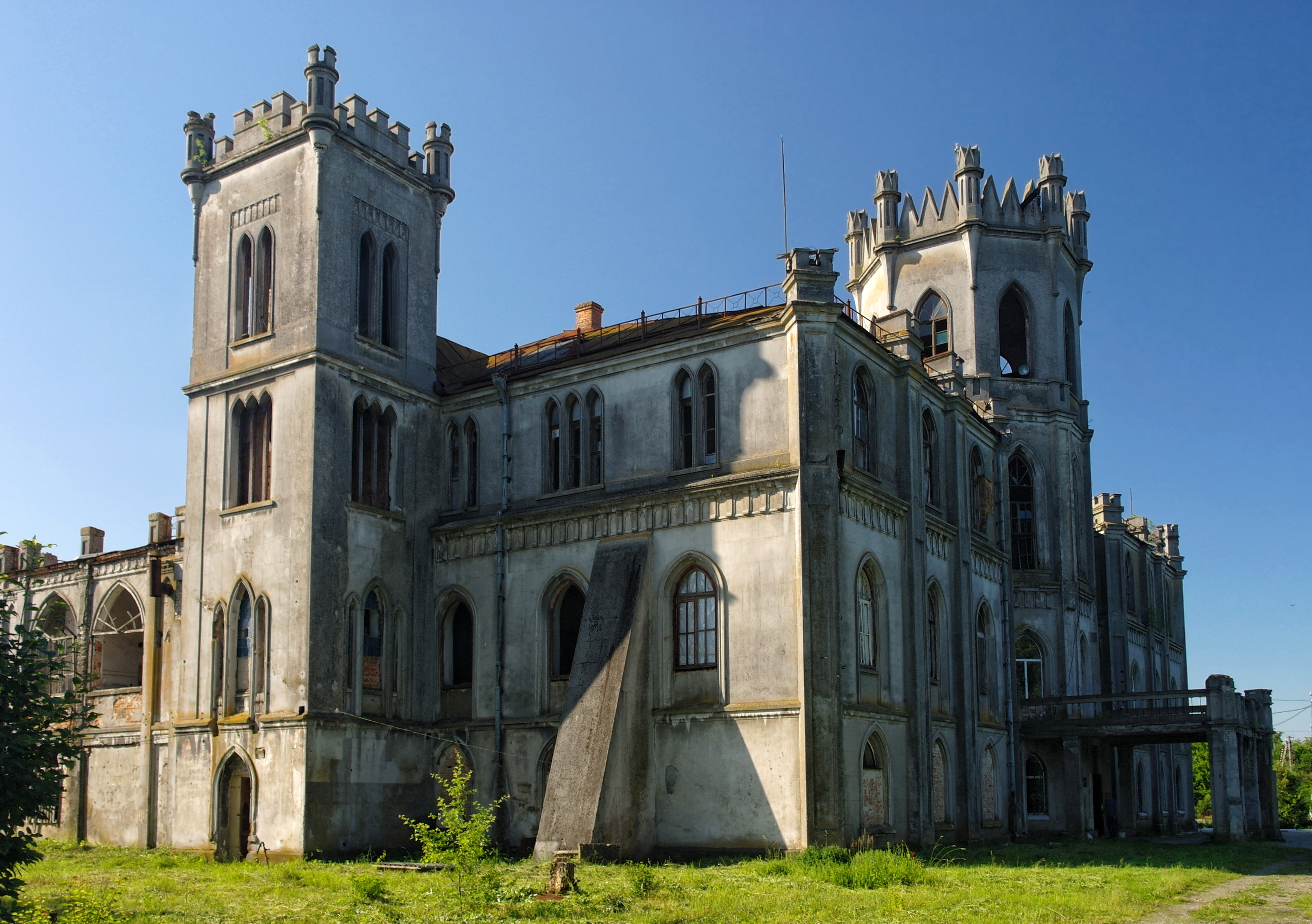 Червоне. Будинок-садиба Терещенка